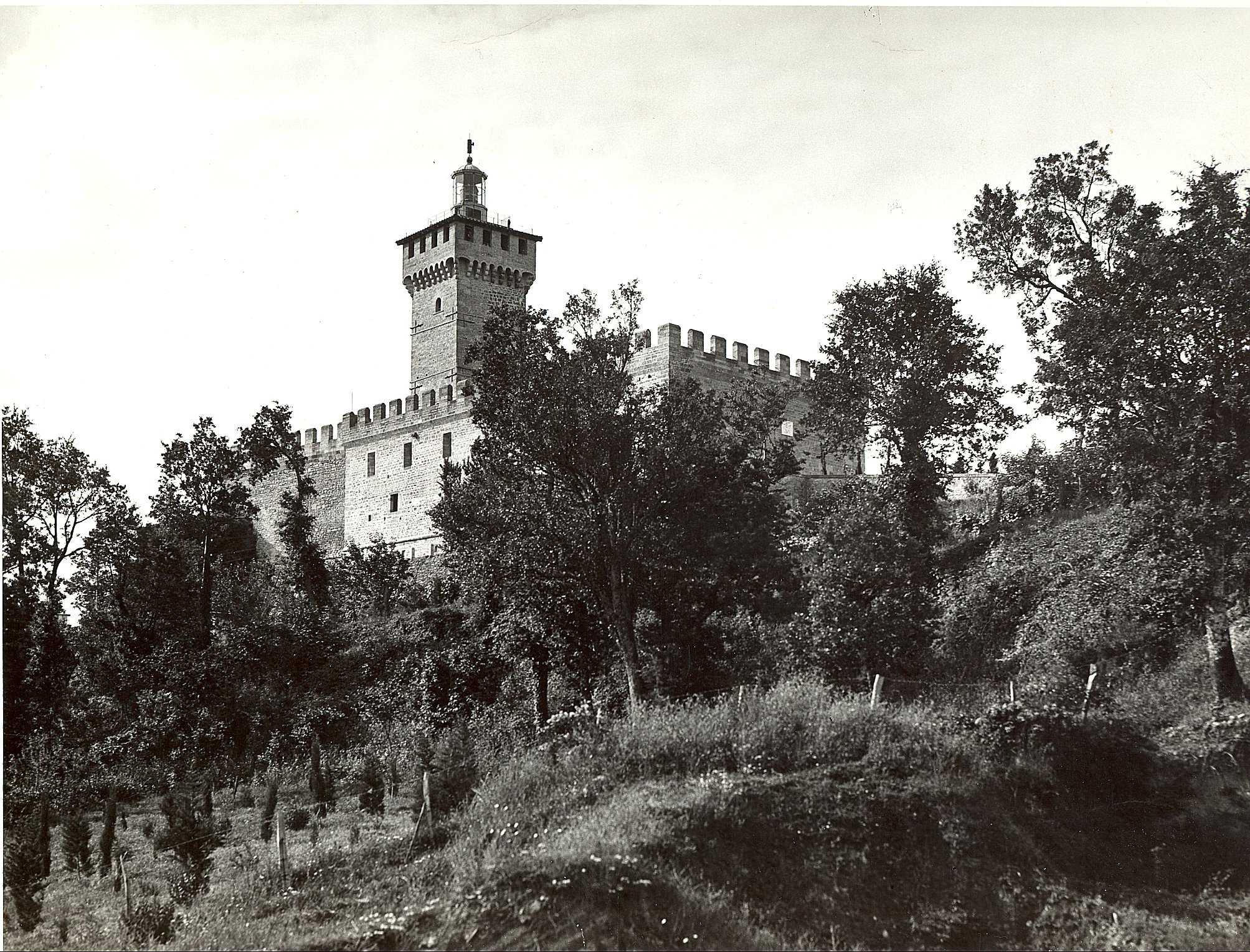 Rocca delle Caminate nel comune di Meldola a 4 km da Predappio (FC)